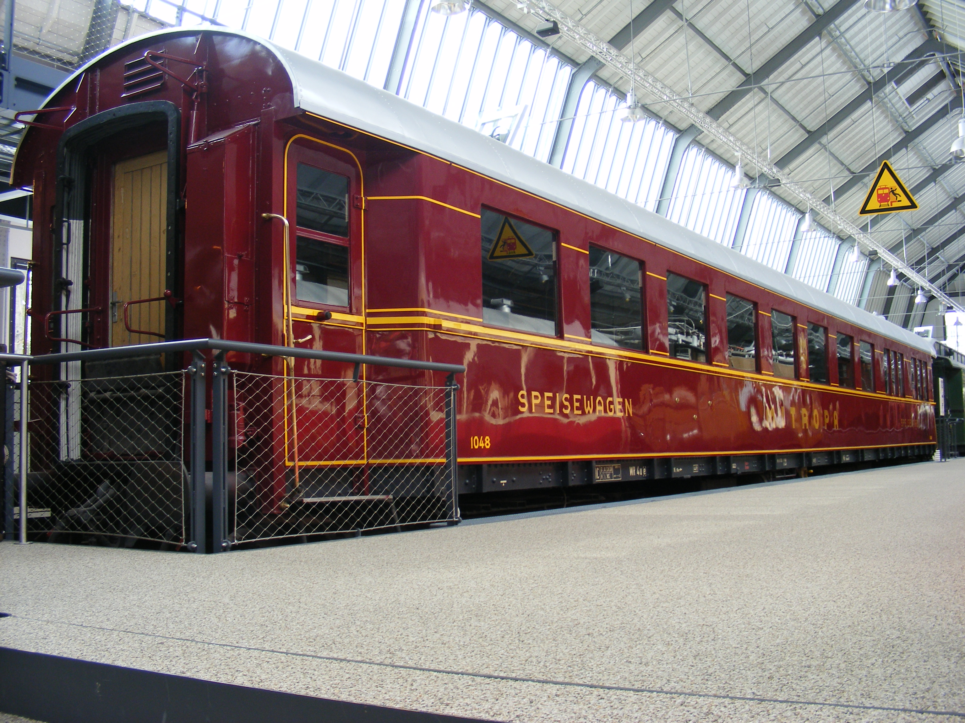 Mitropa-Speisewagen — Exponat im Deutschen Museum Verkehrszentrum München, Halle II.